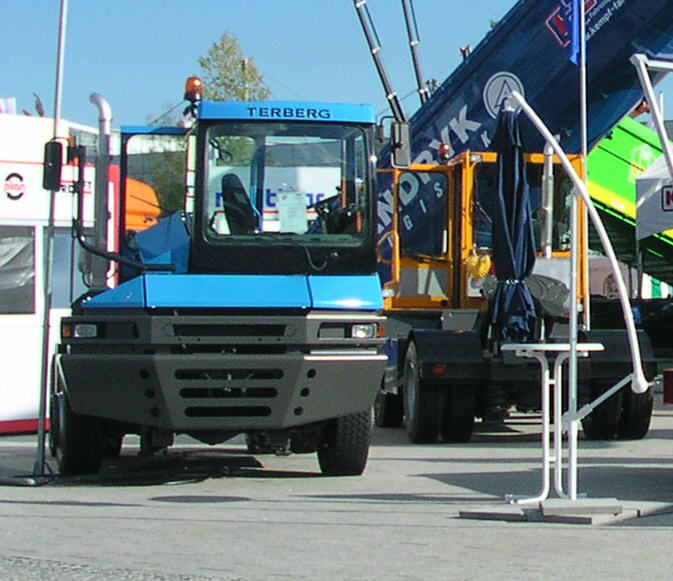 Terberg TT 182/222 (Terminal Trekker) mit der Kabine auf der linken Seite und Terberg YT YT 182/222 (Yard Trekker) mit der Kabine auf der rechten Seite. Gesehen bei der Nutzfahrzeug-IAA 2004 in Hannover